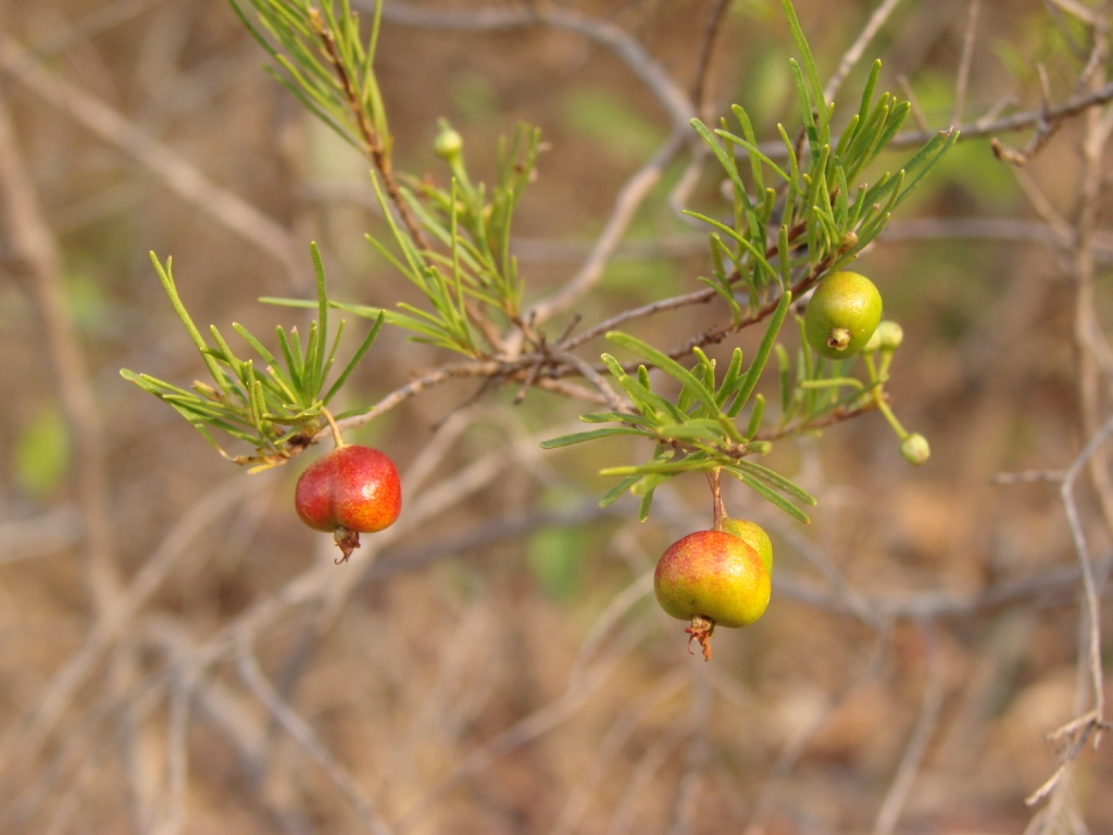 Eugenia angustissima O. Berg - MYRTACEAE - Parque Ecológico Dom Bosco - Brasília - Distrito Federal - Brasil.